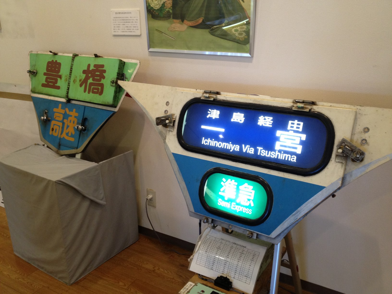 パノラマカーの行き先表示板